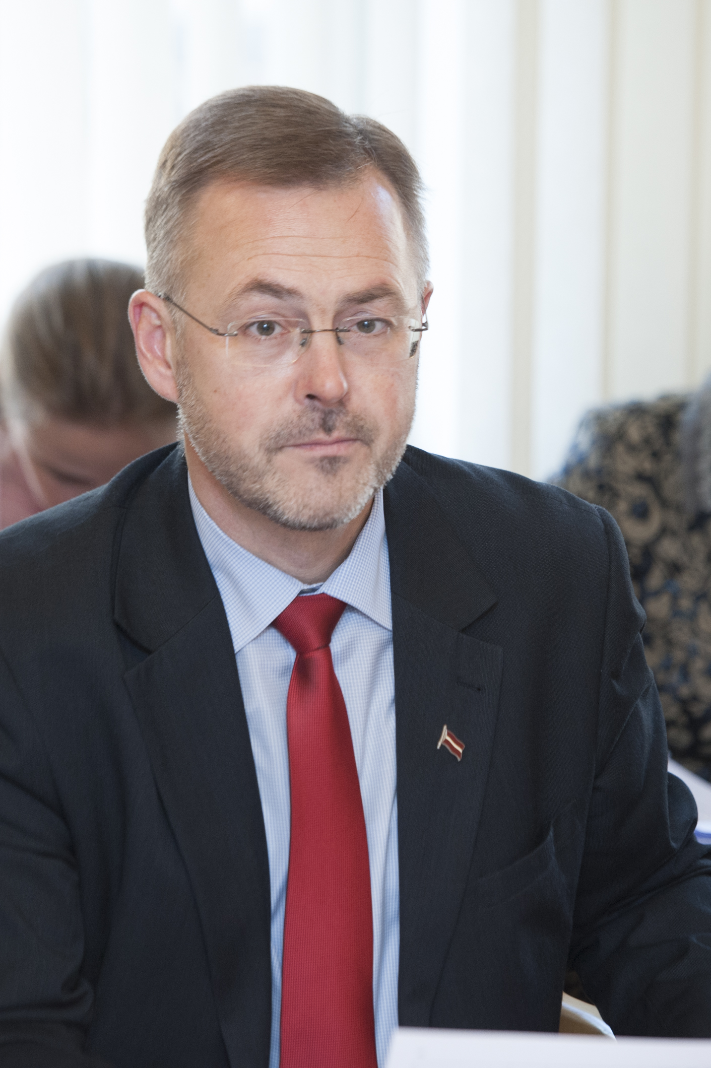 Aleksejs Loskutovs